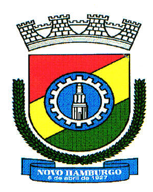 Brasão da cidade de Novo Hamburgo, Rio Grande do Sul, Brasil, aprovado pela LEI MUNICIPAL Nº 064, DE 23/11/70